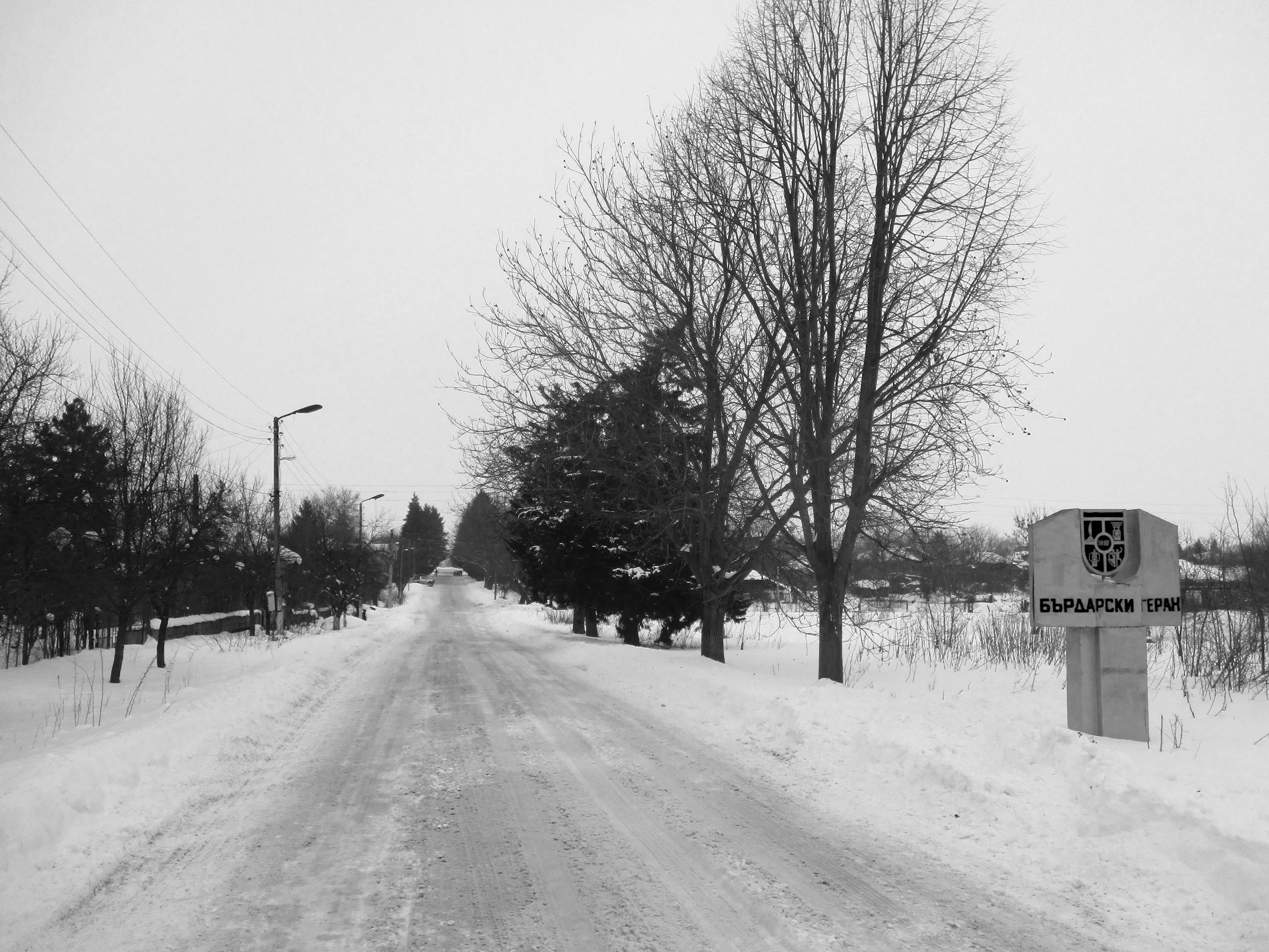 Мястото на герана на бърдарите след 70 години.